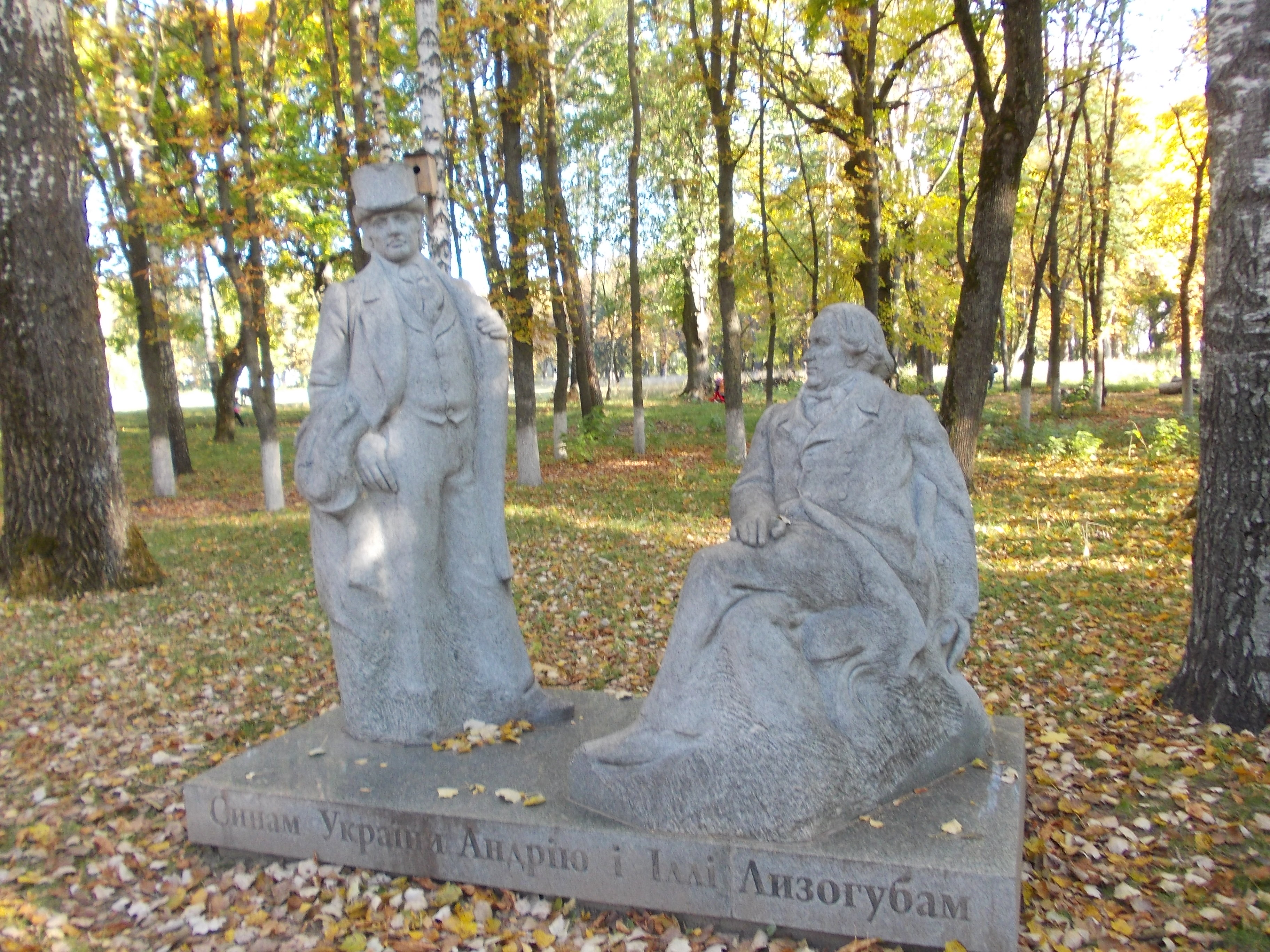 Садиба Лизогуба, Седнів, вул. Т. Шевченка, 11б